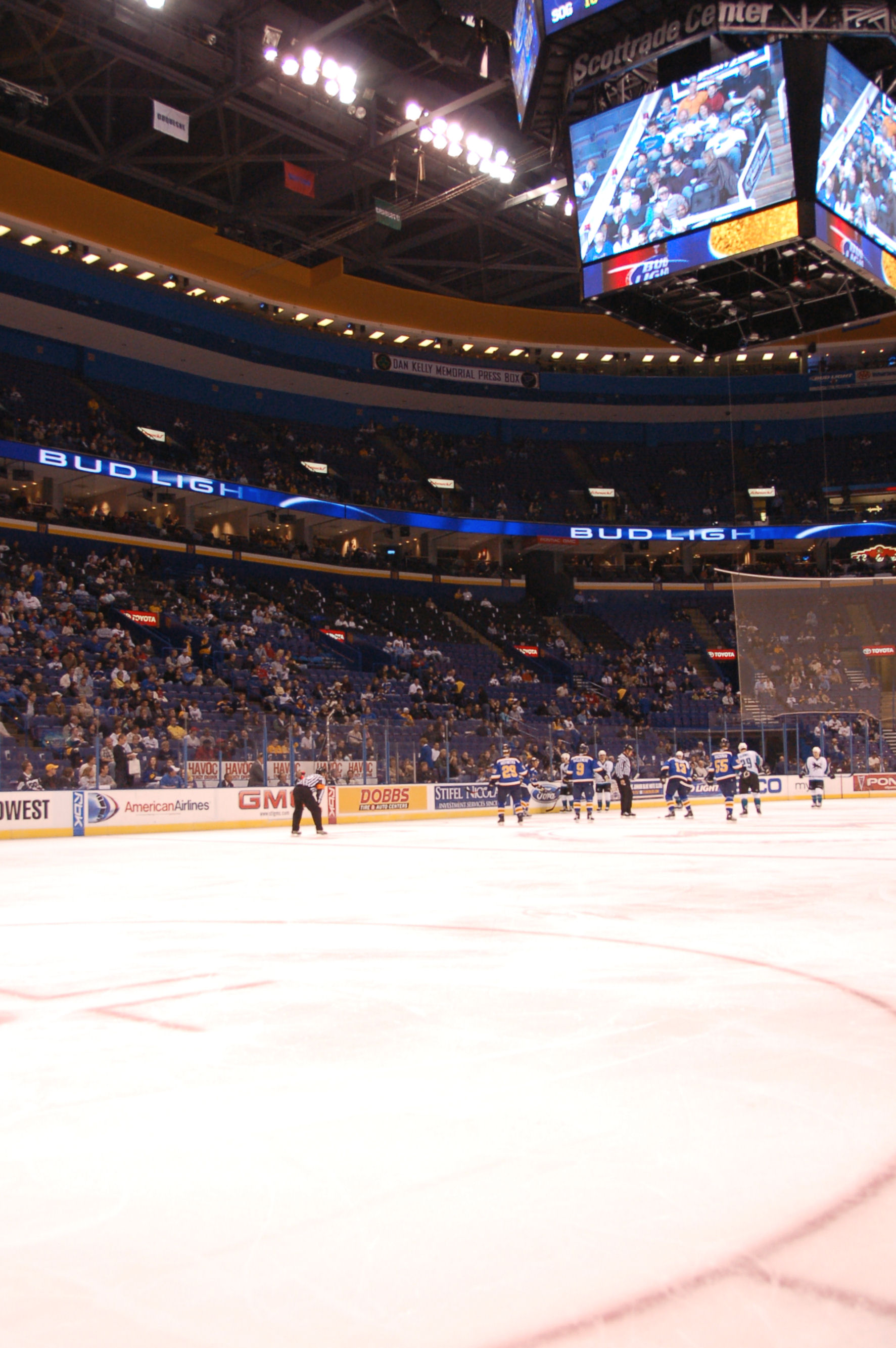 Scottrade Center auteur : Herkie